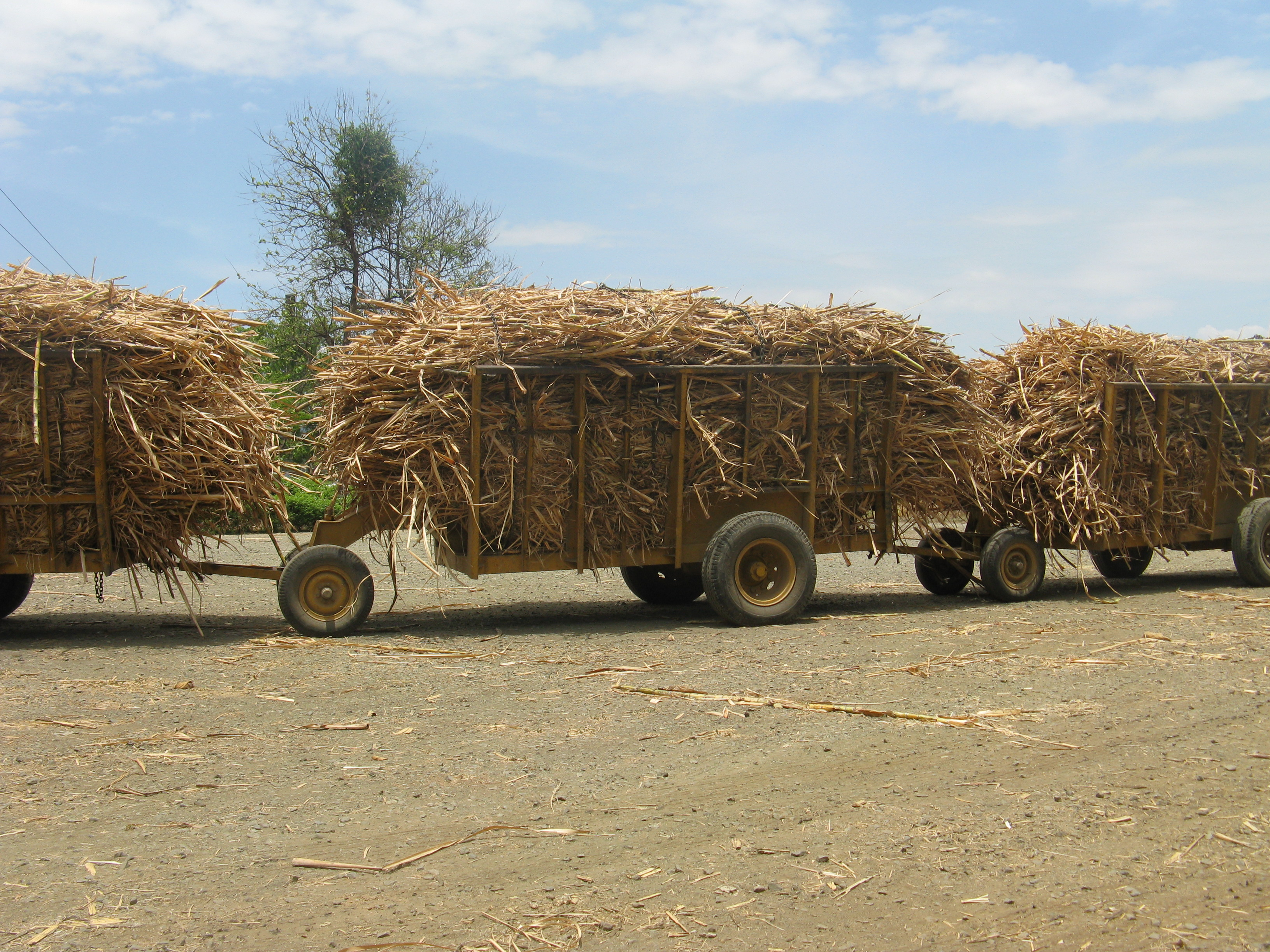 Trasporte de caña en Hacienda San Isidro, Herrera